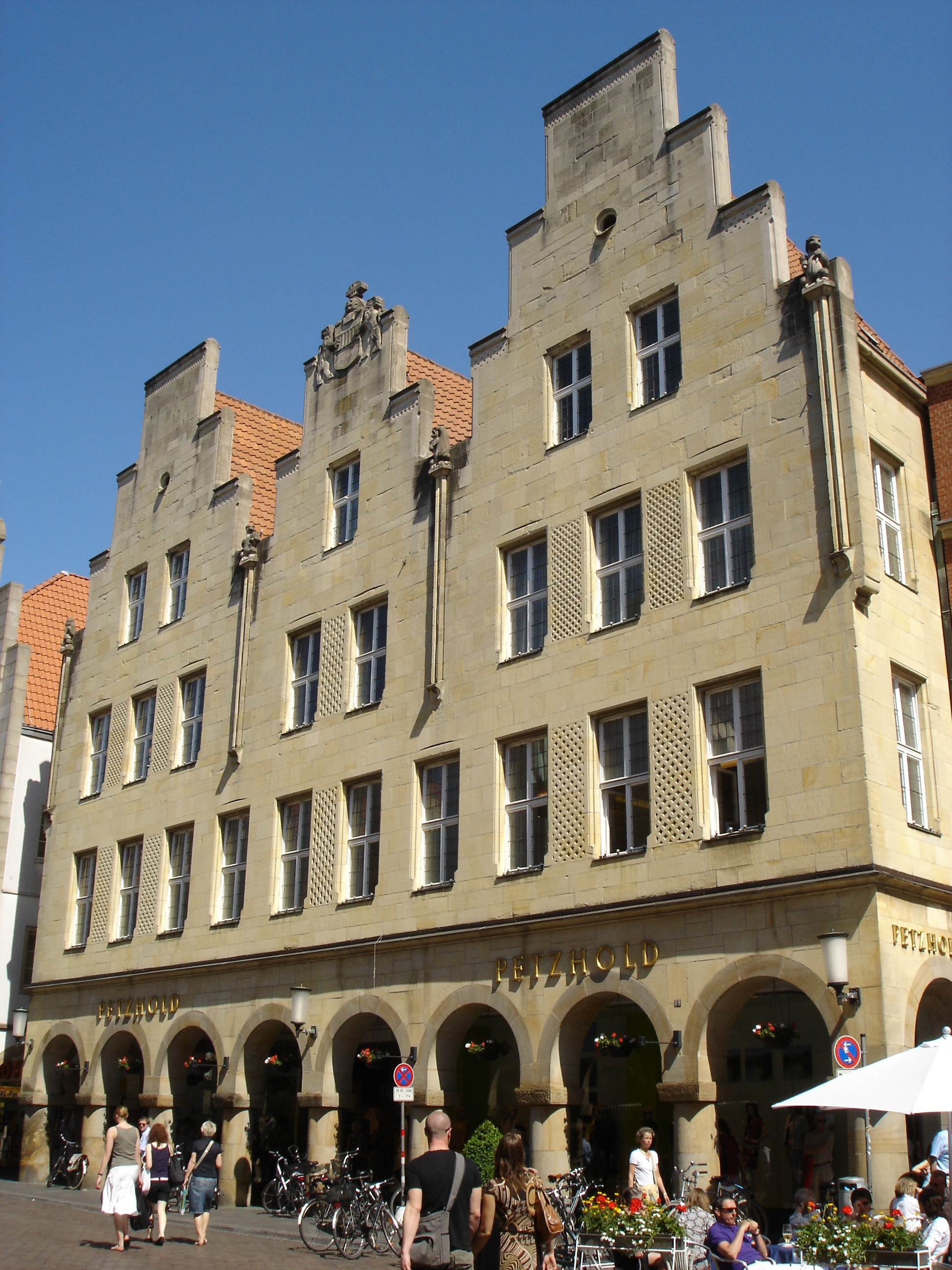 Prinzipal Nr. 5 in Münster, Westphalia, Germany